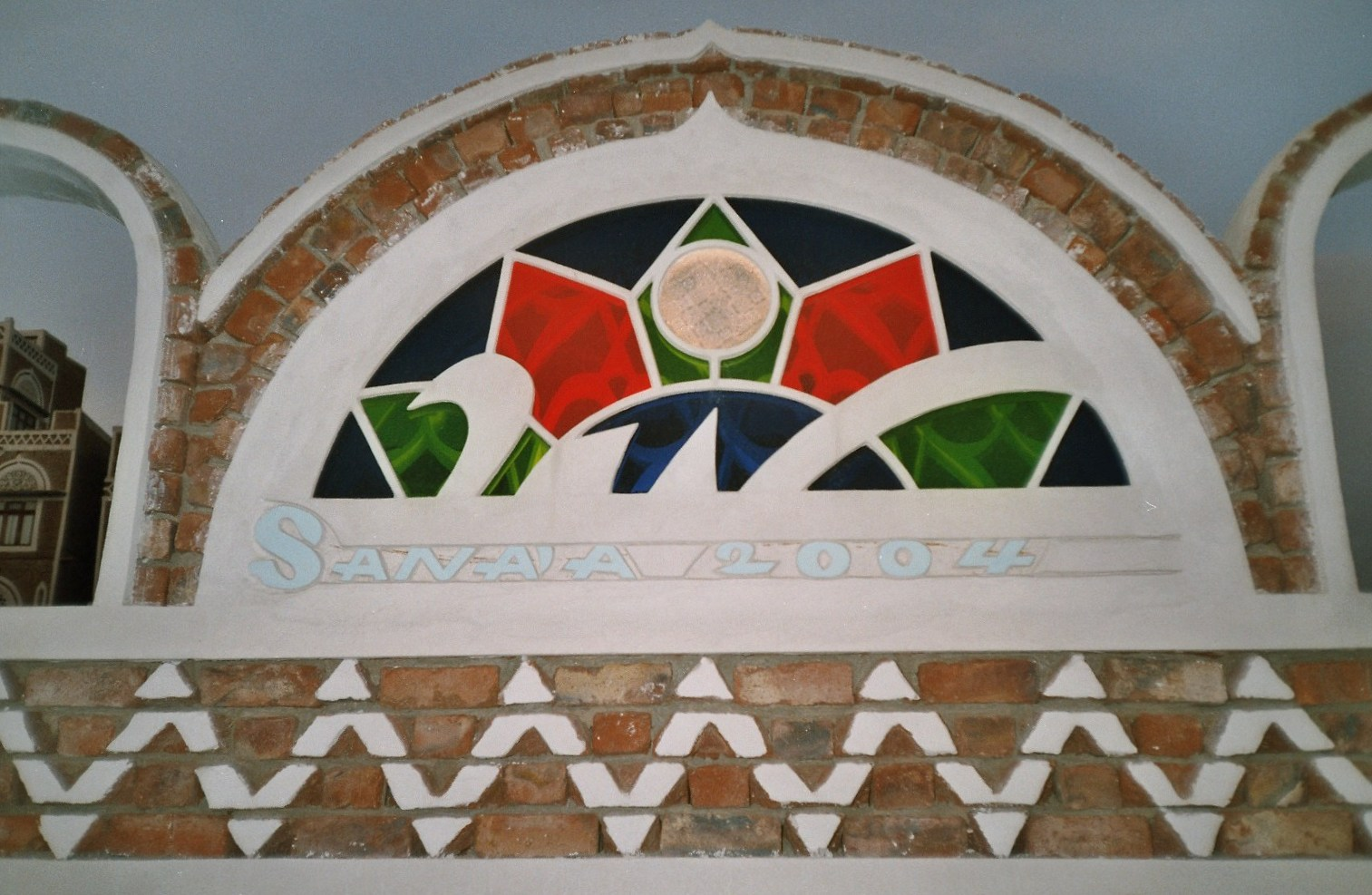 Logo der arabischen Kulturhauptstadt 2004